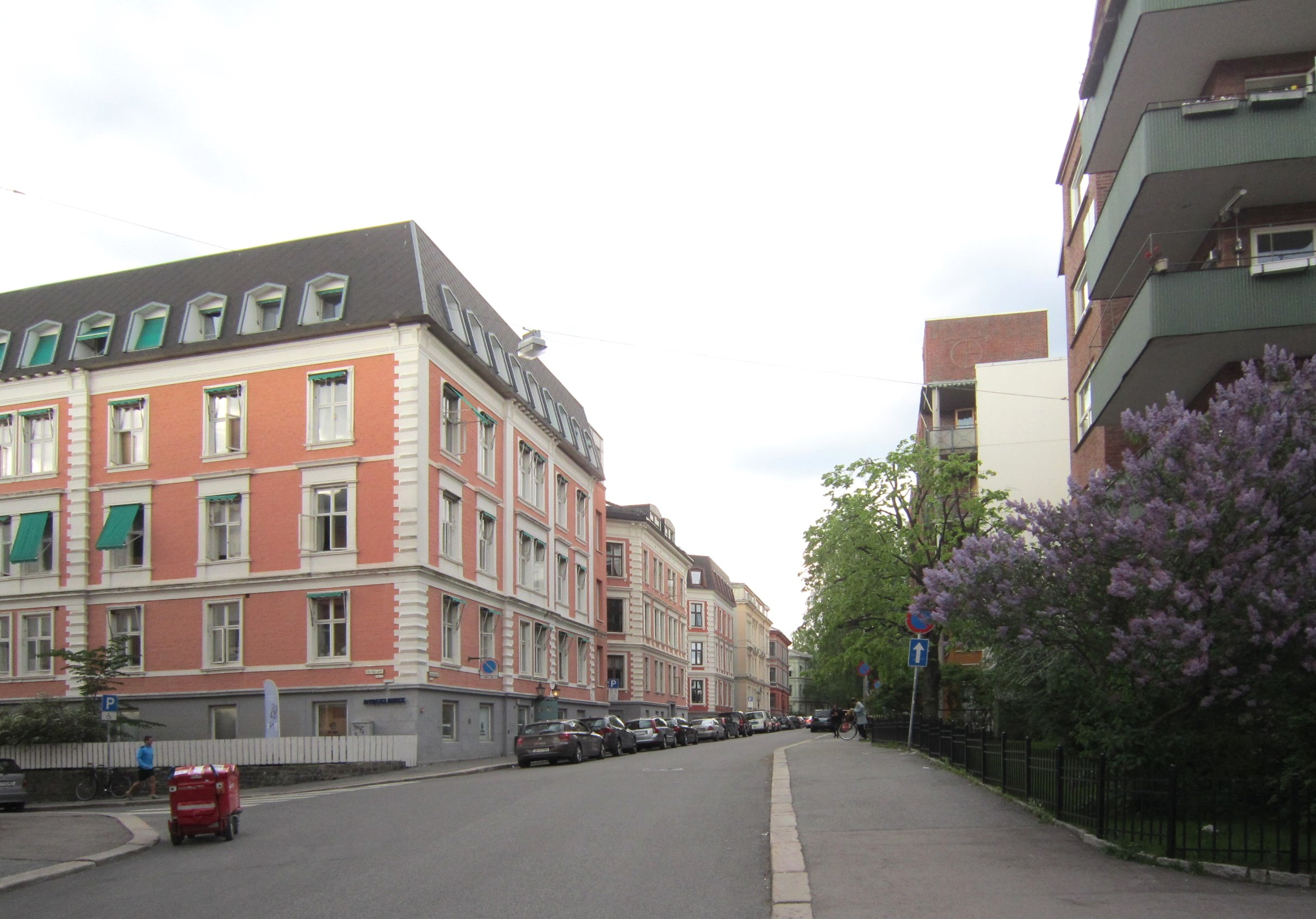 Rosenborggata i Oslo